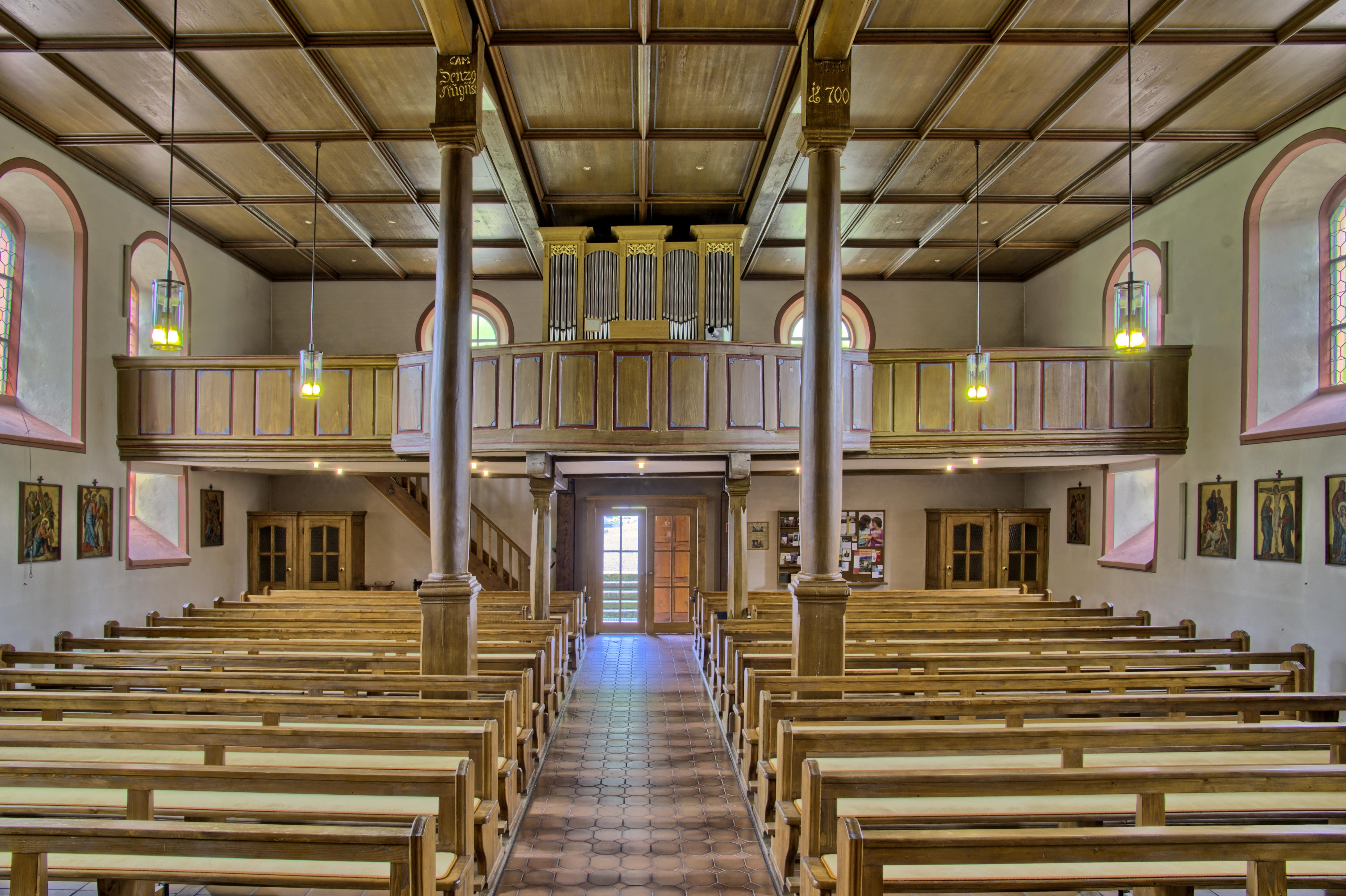 Bilder von der Pfarrkirche St. Mauritius in Prinzbach bei Biberach